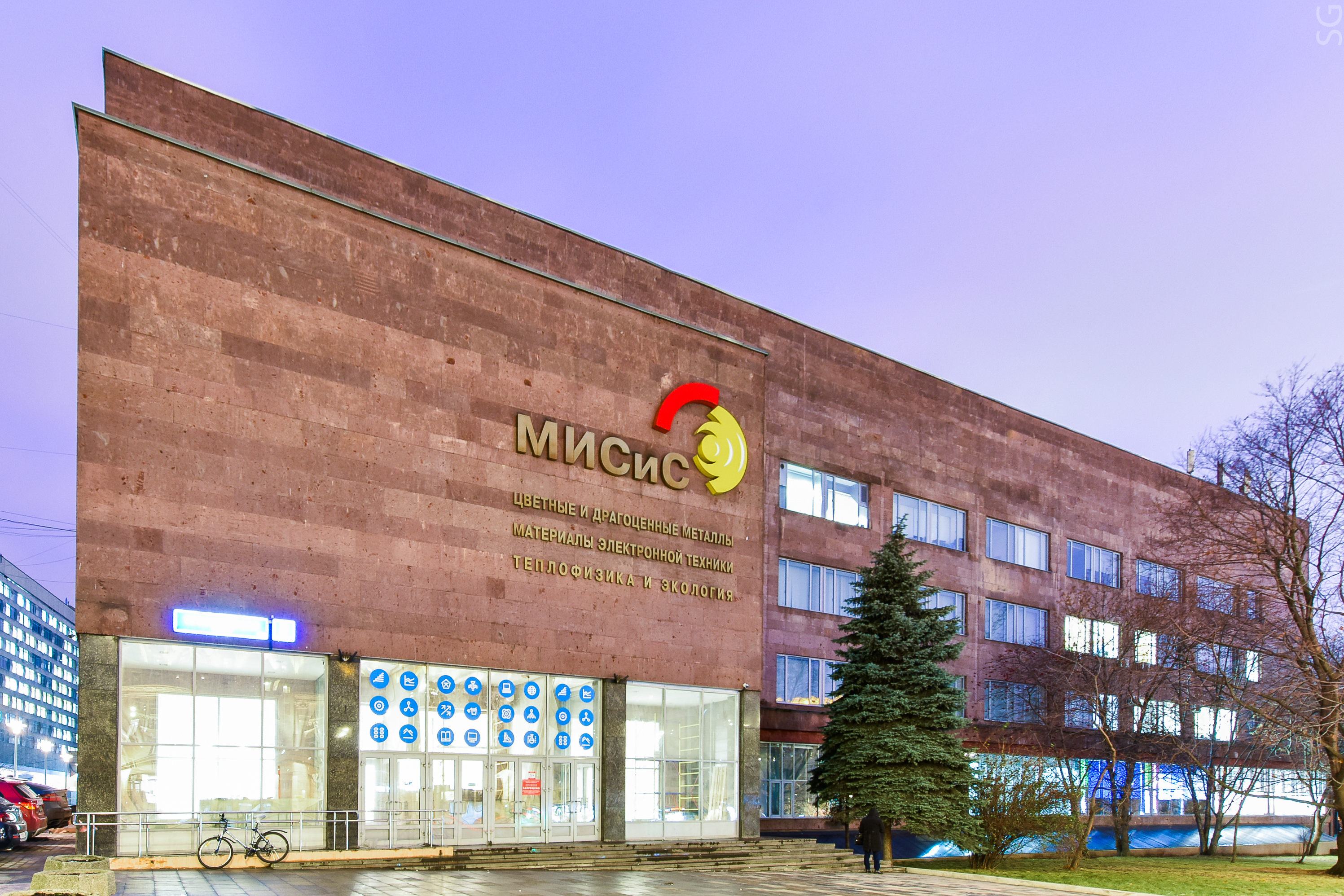 Учебно-лабораторный корпус Национального исследовательского технологического университета "МИСиС", расположенный по адресу: Крымский вал, дом 3